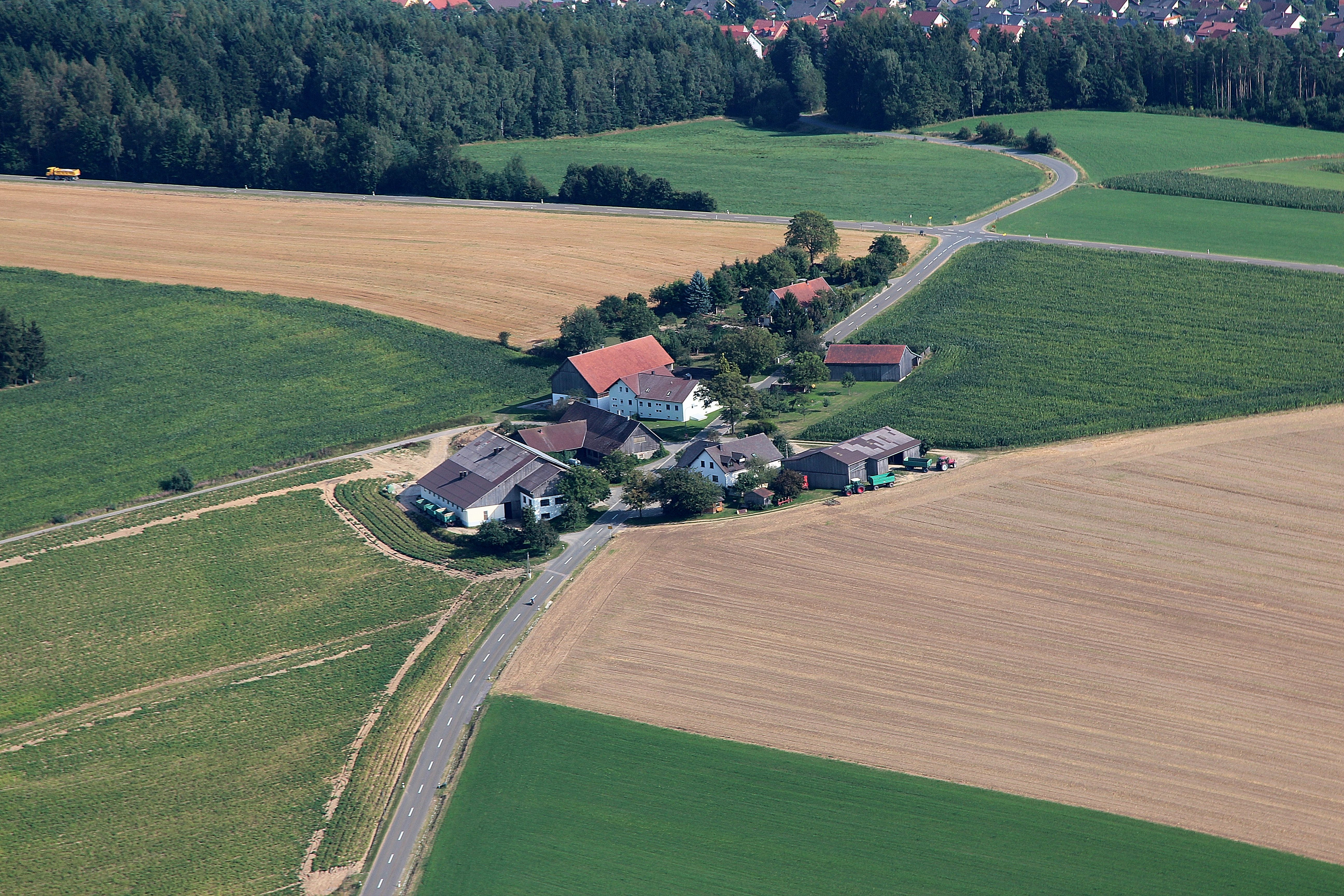 Altweichelau, Gemeinde Niedermurach, Landkreis Schwandorf, Oberpfalz, Bayern